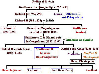 Généalogie des ducs de Normandie. Réalisé par l'utilisateur Urban. Légende Les ducs apparaissent en marron avec leurs dates de règnes entre parenthèses En rouge, les membres de la famille ducale qui n'ont pas été ducs En violet, les filles de la famille ducale Encadré bleu = rois d'Angleterre "+" = mariage richard 1 epouse emma de France richard 3 adele de France guillaume le conquerant epouse mathilde de hainault